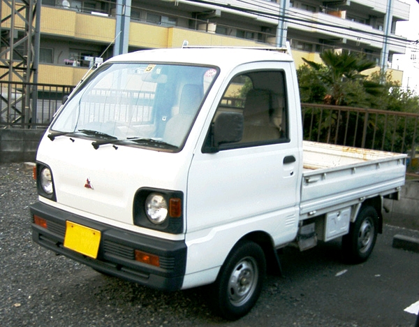 MITSUBISHI_Minicab_42TD 1990